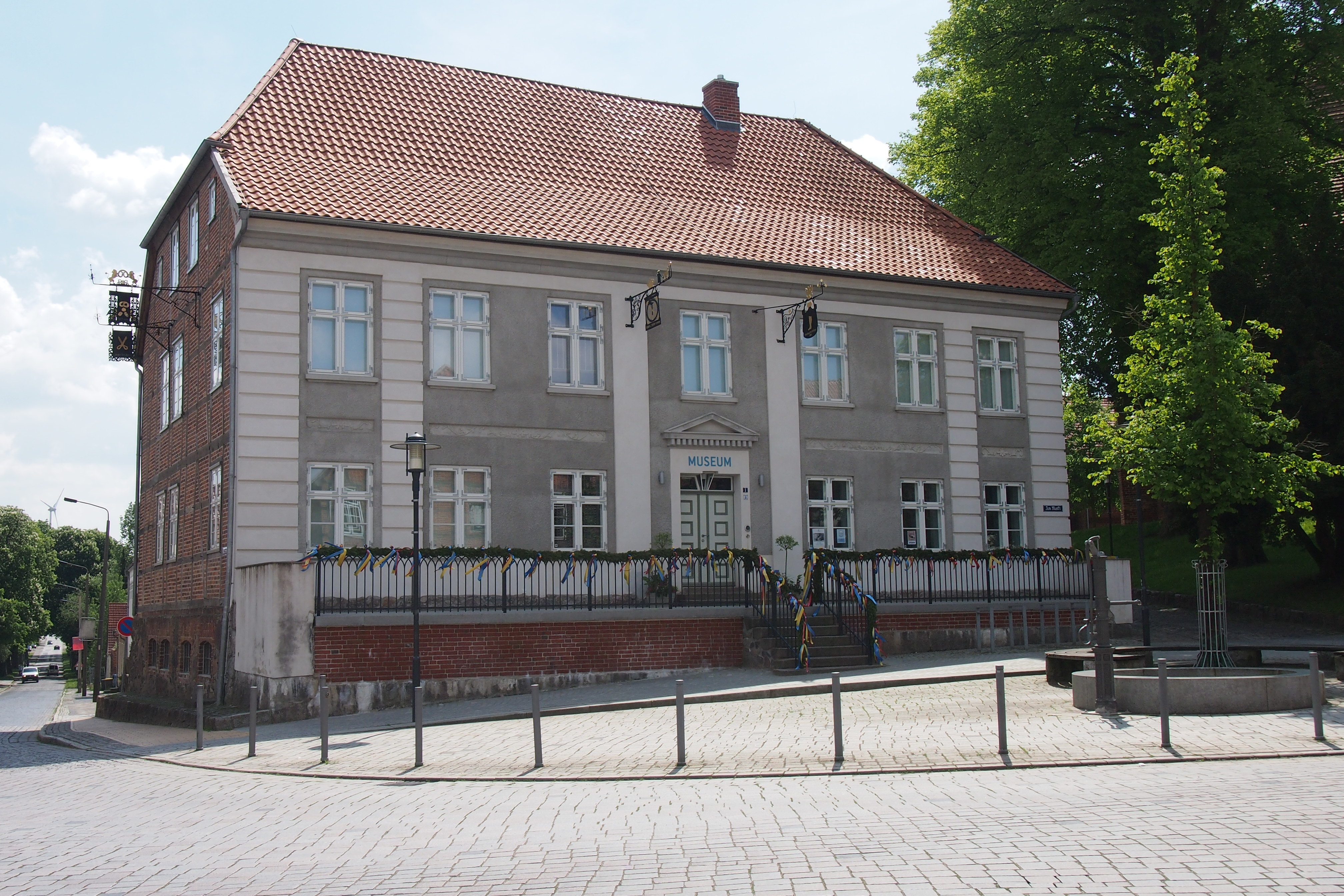 Bürgerwohnhaus aus der 1. Hälfte des 19. Jh. seit 2017 Museum.